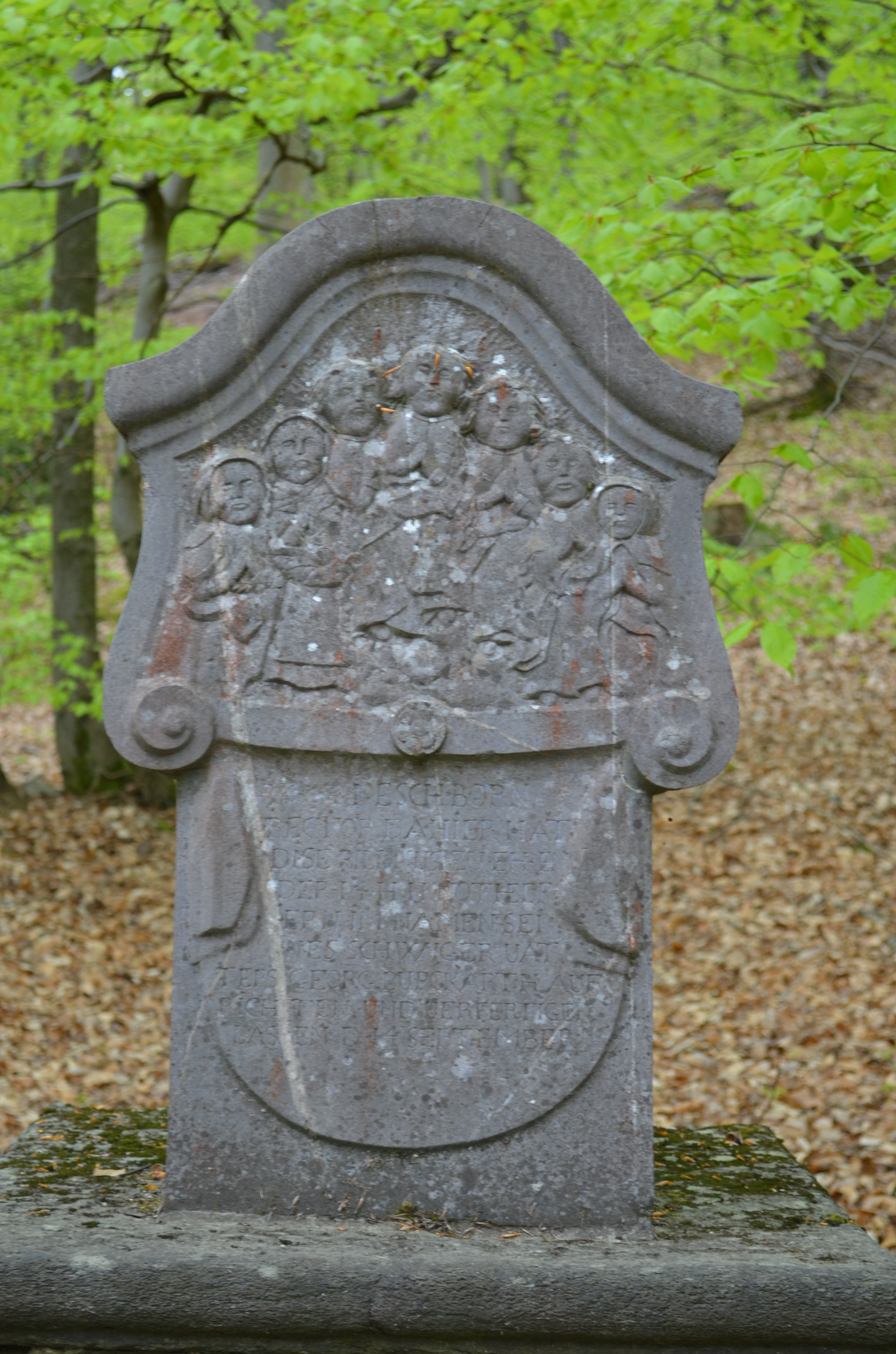 Königstein, Kreuzweg Romberg, Station 12, Rechts, Detail